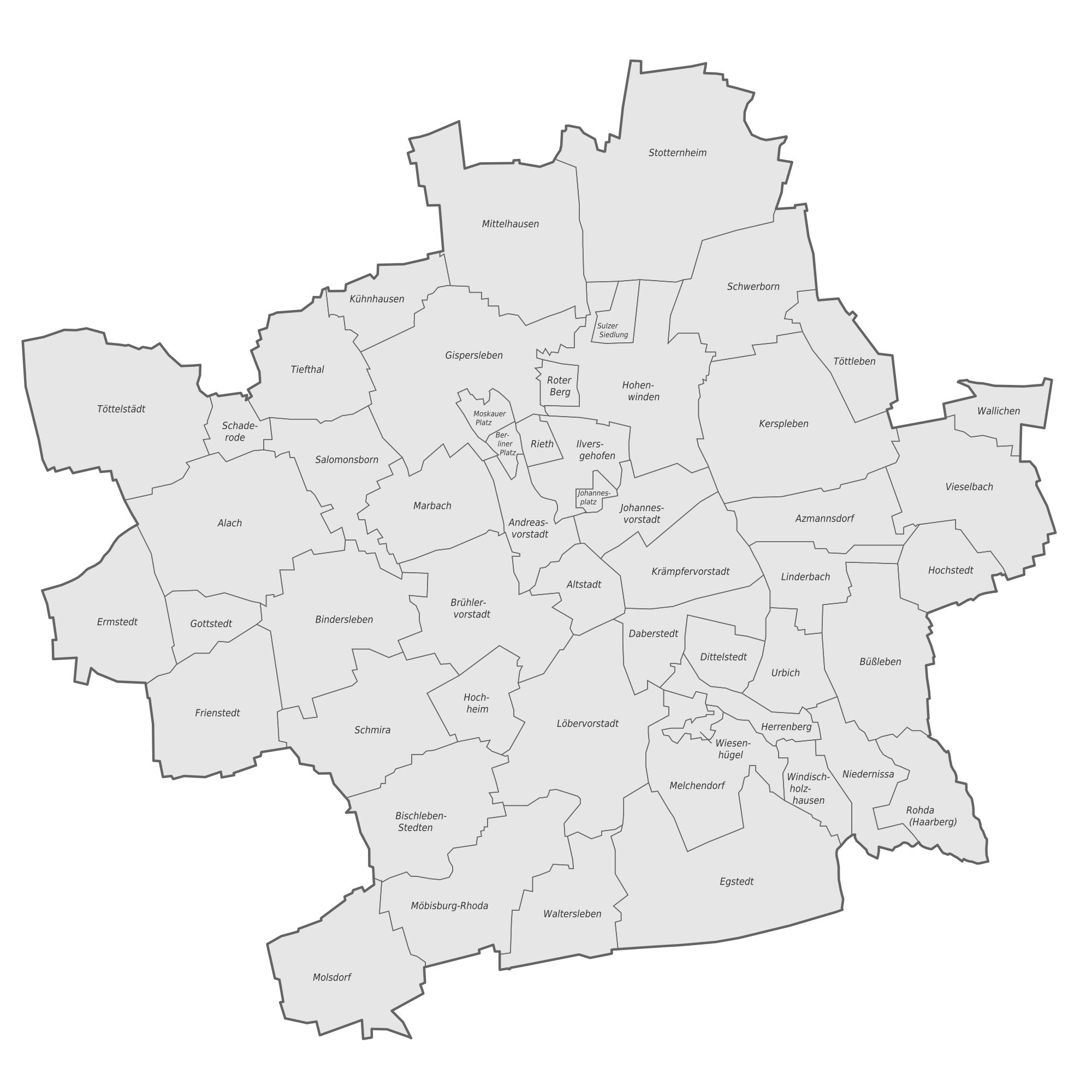 Karte des Stadtgebietes von Erfurt unterteilt in die Ortsteile.